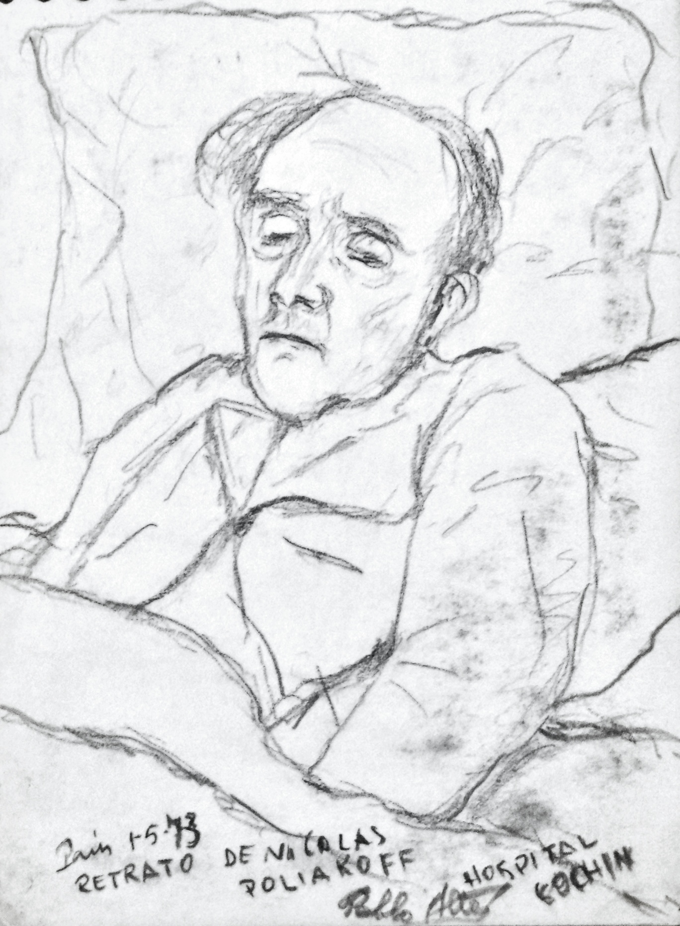 Portrait du peintre russe Nicolas Poliakoff sur son lit de l'hôpital Cochin à Paris le 1er Mai 1973. Dessin original de Pablo Altés Aguilera (Merci de citer la source en cas d'utilisation et de prévenir l'auteur à ) Retrato del pintor ruso Nicolás Poliakoff en su cama del hospital Cochin en París, el día 1 de Mayo del 1973. Dibujo original de Pablo Altés Aguilera (Gracias por dar crédito al autor en caso de que se use la imagen y de dar parte a ) Portrait of the Russian painter Nicolas Poliakoff, lying on its bed at the Cochin hospital in Paris, France, on May 1st 1973. Original drawing by Pablo Altés Aguilera (Please give credit to the author in case of using the work and give notice to )